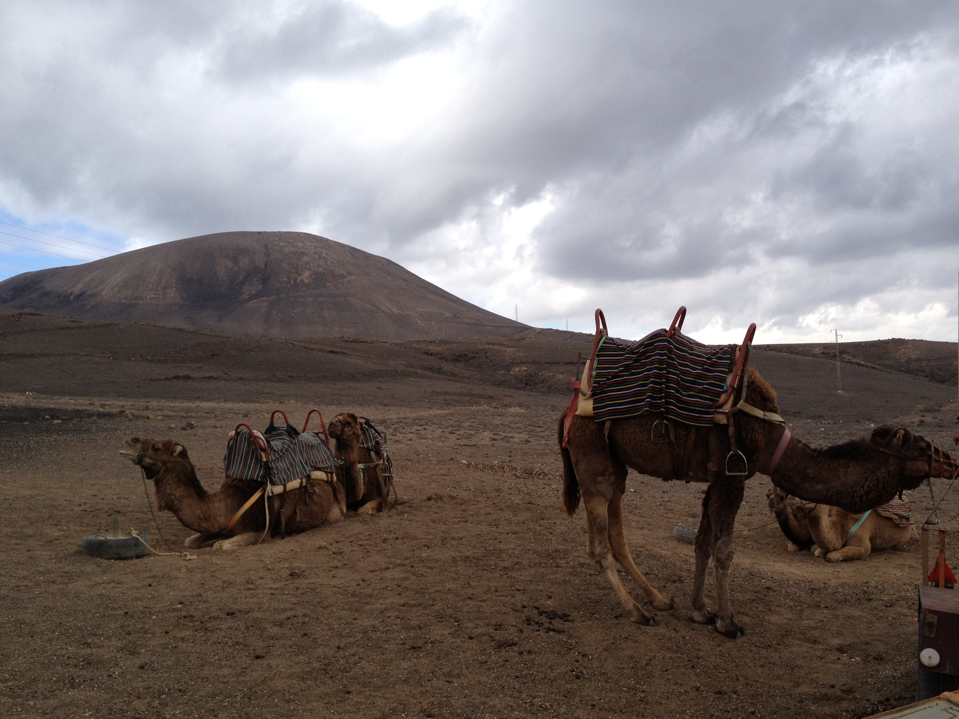 At approximately one kilometer from Macher in the road to Yaiza